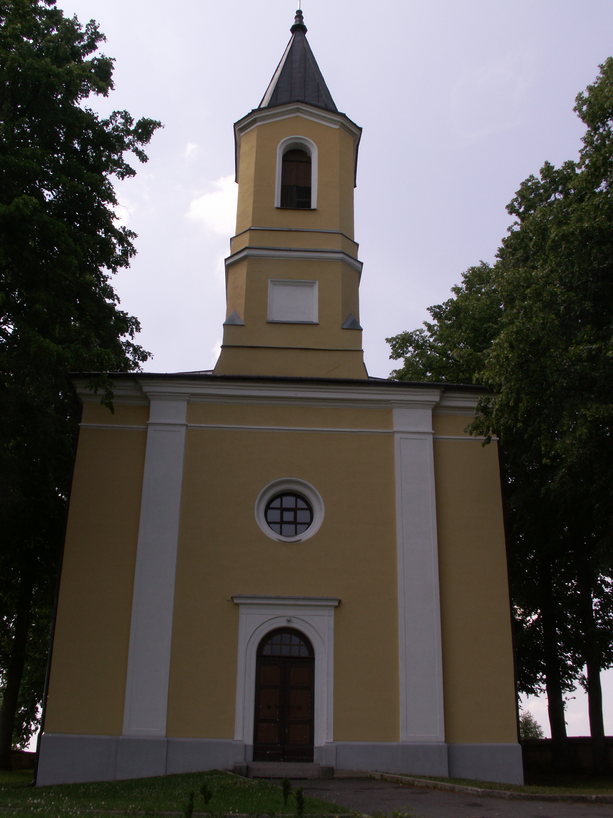 Lísek, okres Žďár nad Sázavou, kostel svatého Mikuláše